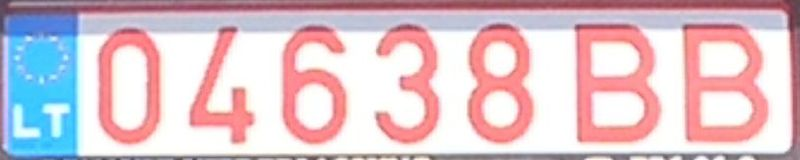 Транзитный номер Литвы, с 2004 года